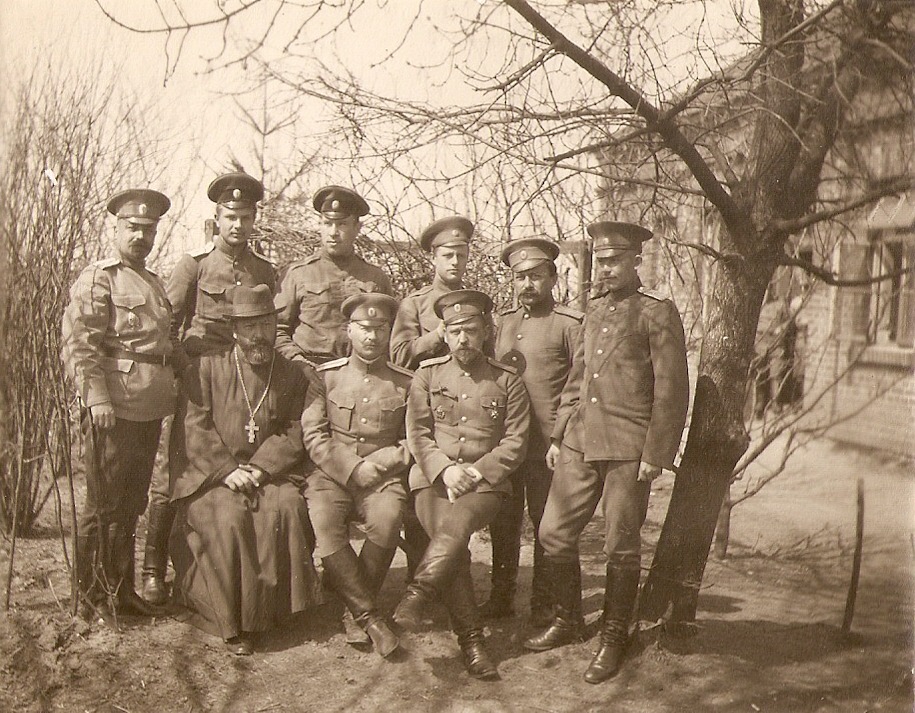 1914г. Маштаков стоит второй слева.